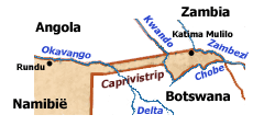 Dit zelf gefabriceerde kaartje laat de Caprivistrip in Namibië zien: een smalle strook land (30 km breed en 450 km lang) gelegen tussen Angola/Zambia en Botswana.